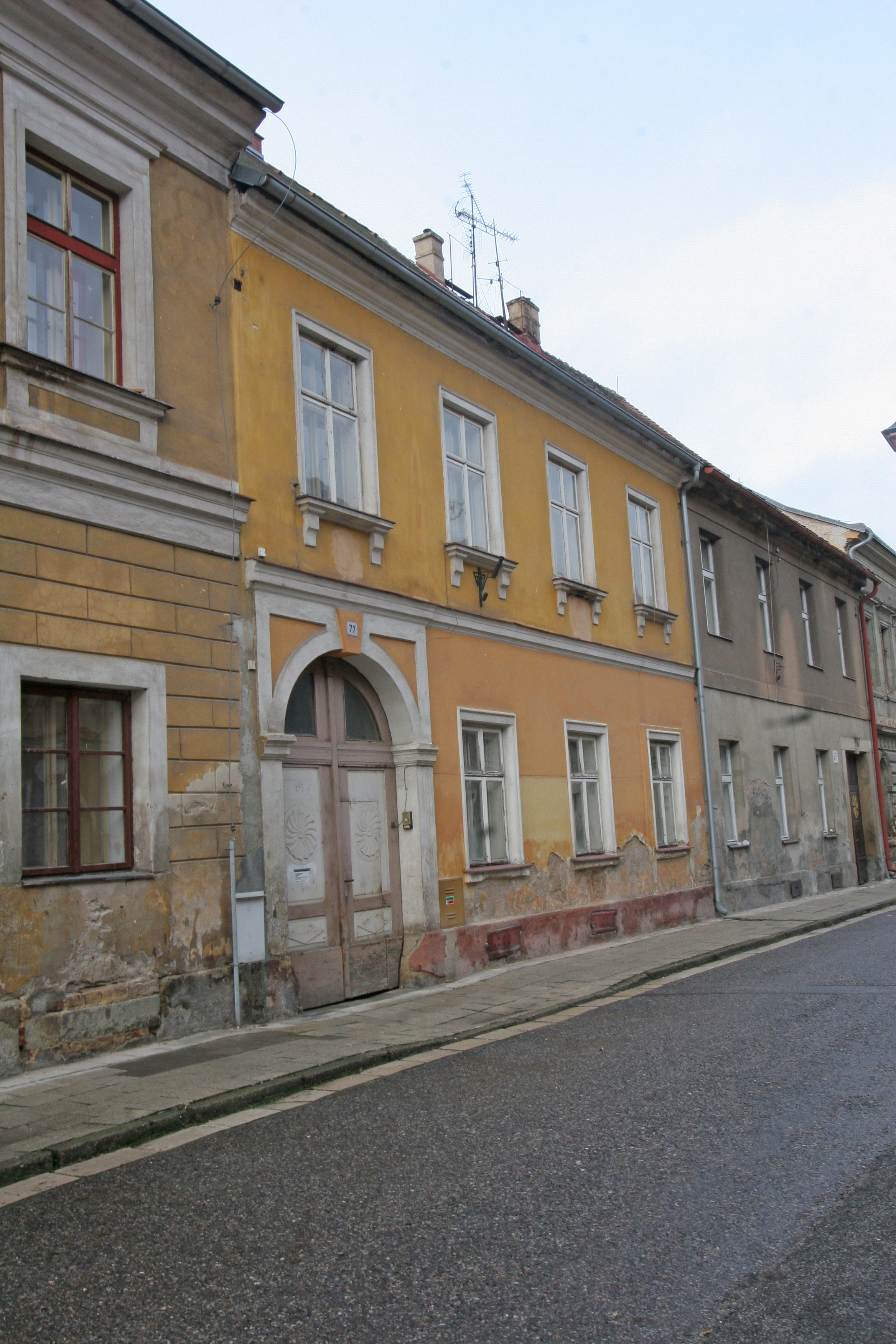 Fara, Jaroměř-Josefov, Duškova 77